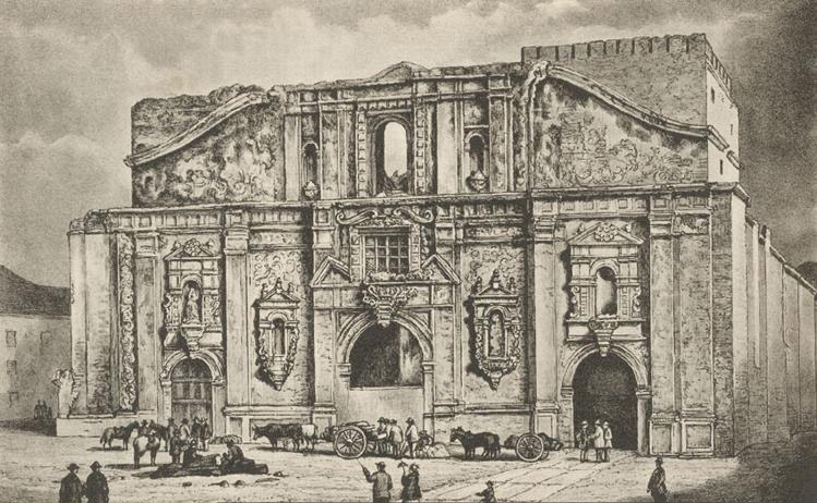 Iglesia de la Compañía después del incendio, ca. 1863 (Santiago de Chile)